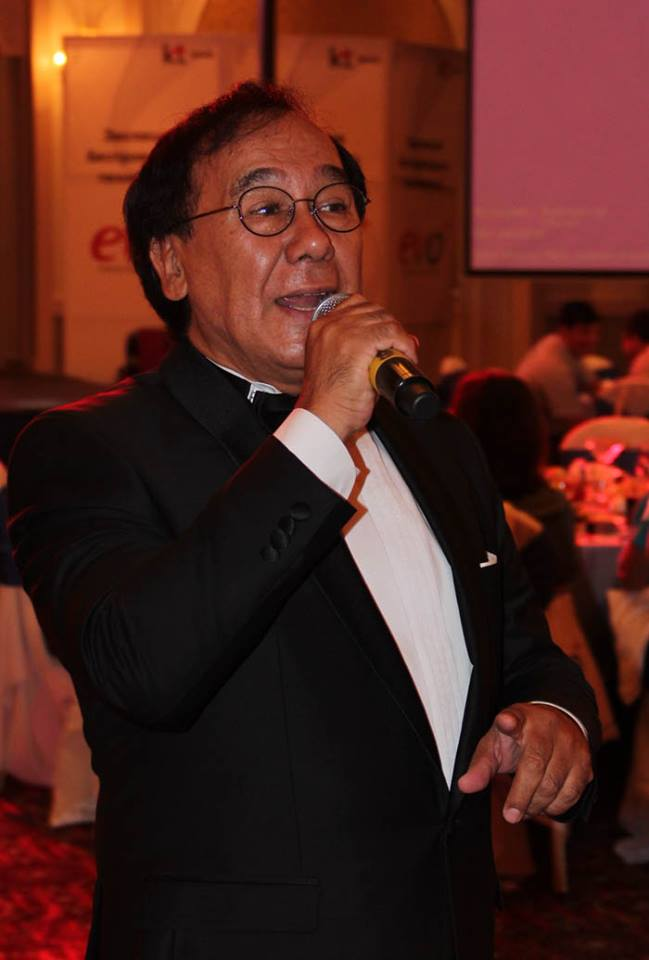 Народный артист Узбекистана Мансур Ташматов